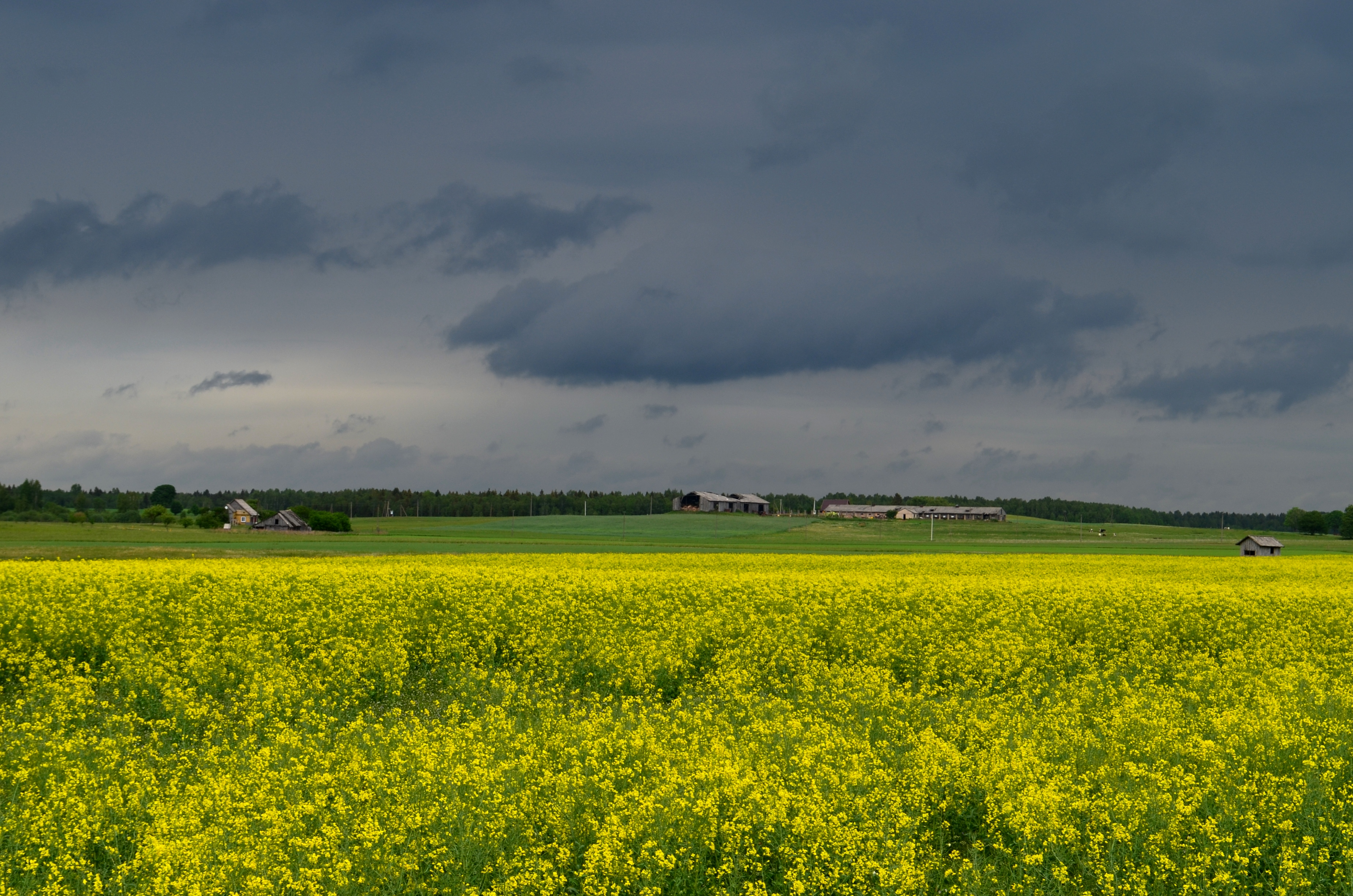 Maižiškiai, Raseinių r.